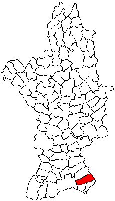 Categorie:Hărţi ale judeţului Olt